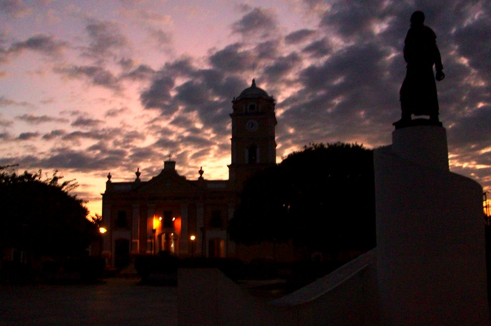 Amanecer en la Plaza Bolívar del Municipio Tinaco del Estado Cojedes. Eran aproximadamente las 5 de la mañana. La iluminación está bastante mala, pero no se puede esperar mucho a esa hora de la mañana...